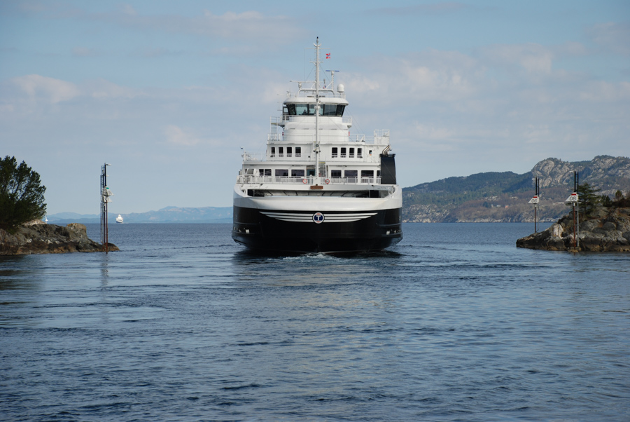 «Færøy» ved Sandvikvåg fergekai. Foto Harald Sætre